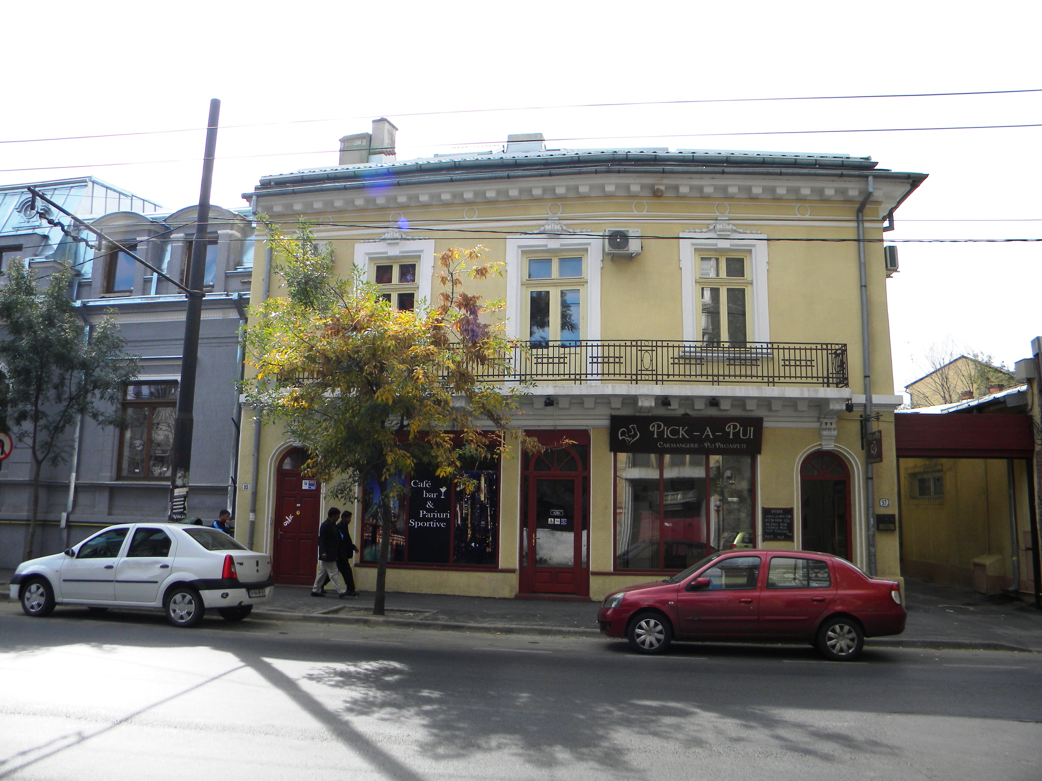 Bucuresti, Romania, Casa pe Calea Grivitei nr. 95-97, sect. 1 (2)